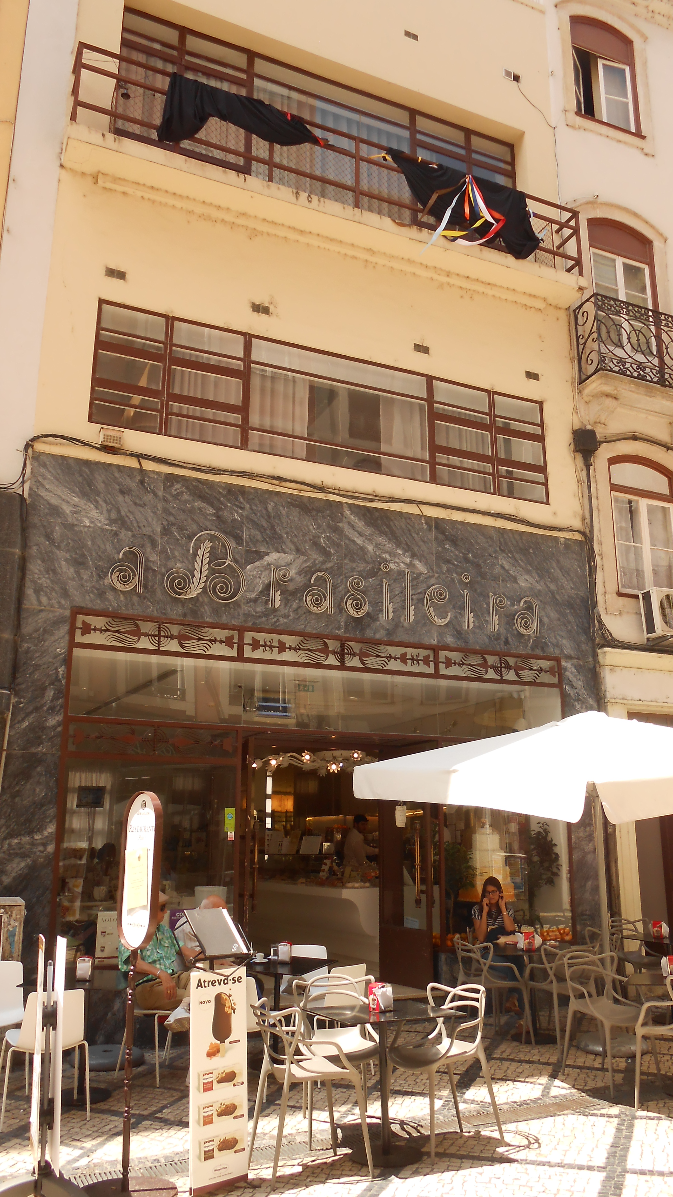 O café A Brasileira na Rua Ferreira Borges, na baixa de Coimbra.